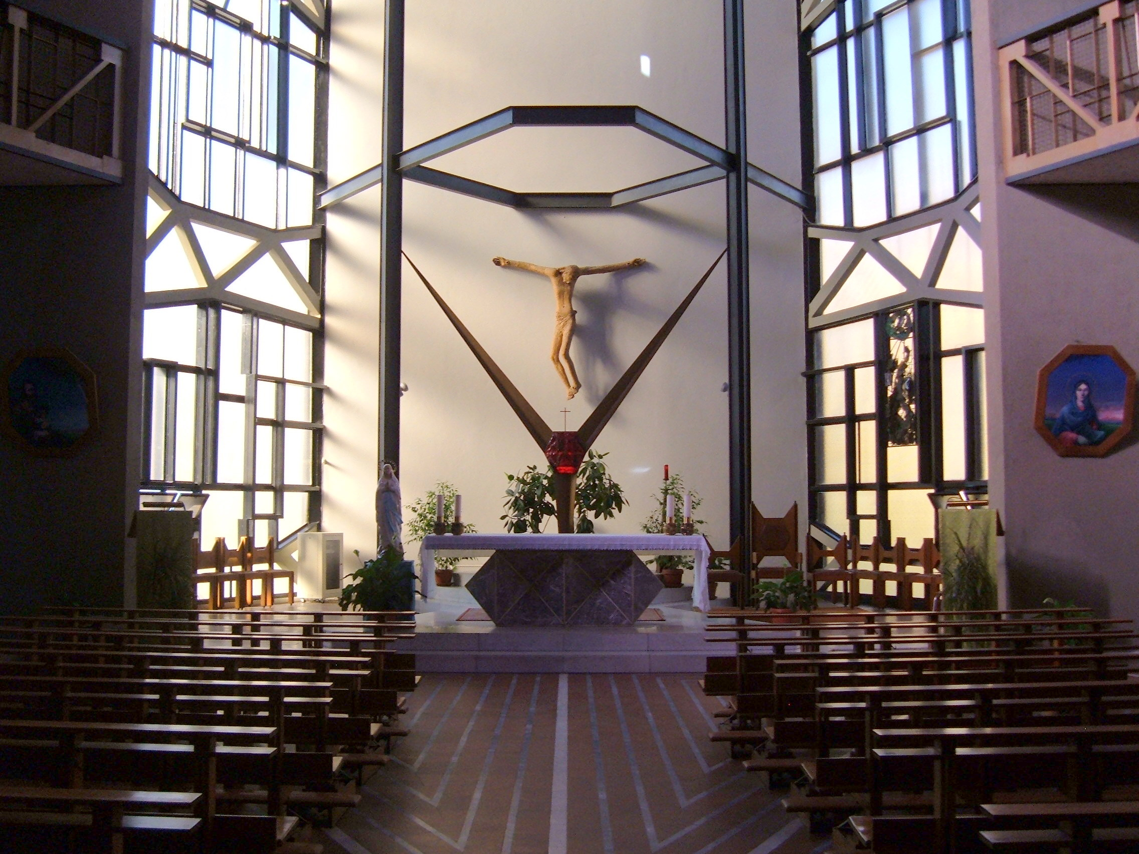 Chiesa parrocchiale di Santa Marcella, a Roma, nel quartiere Ostiense, in piazza Nicoloso da Recco.